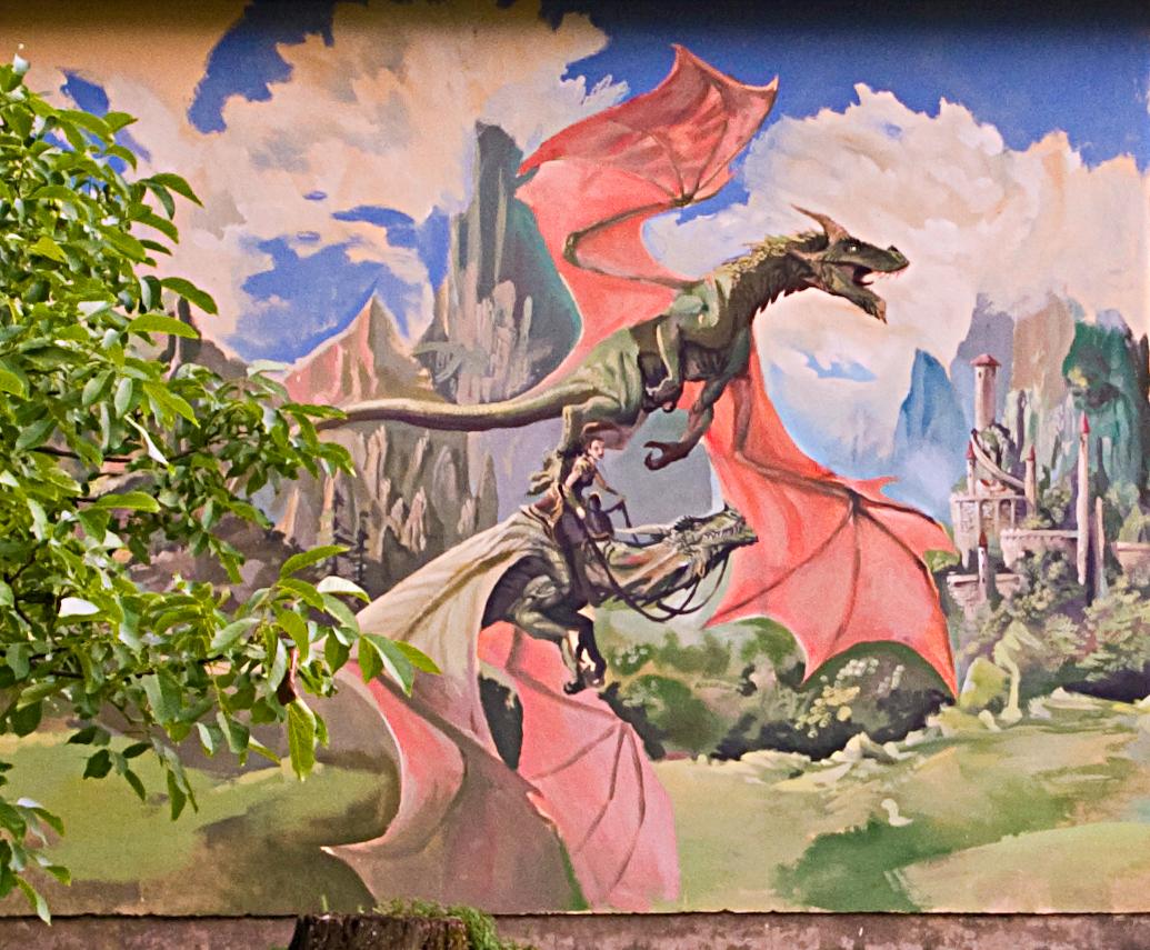 Grafiti u Crikvenici